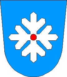 Tali valla vapp